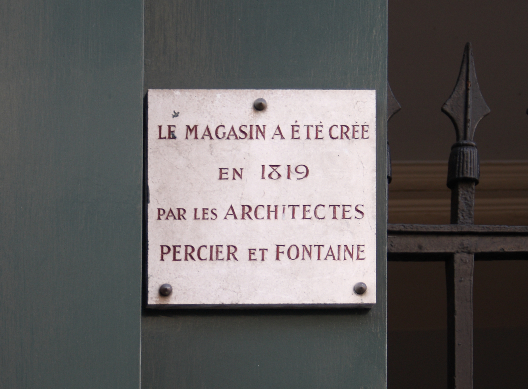 Gedenktafel an der Confiserie Debauve et Gallais in Paris (7. Arrondissement), 30 rue des Saints-Pères